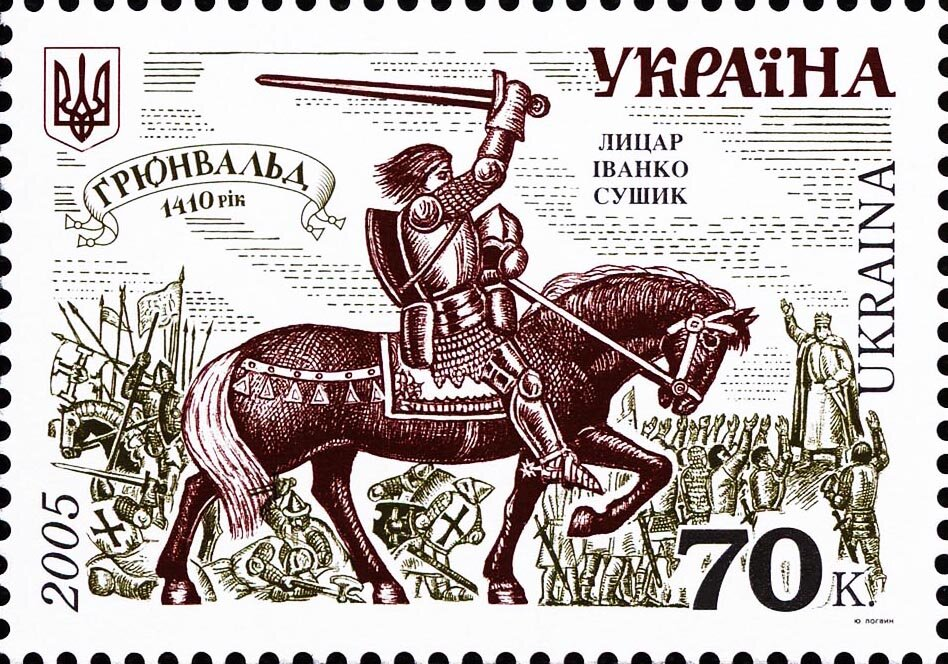 Поштова марка України, 2005 р. Серія "Історія війська в Україні 2005"